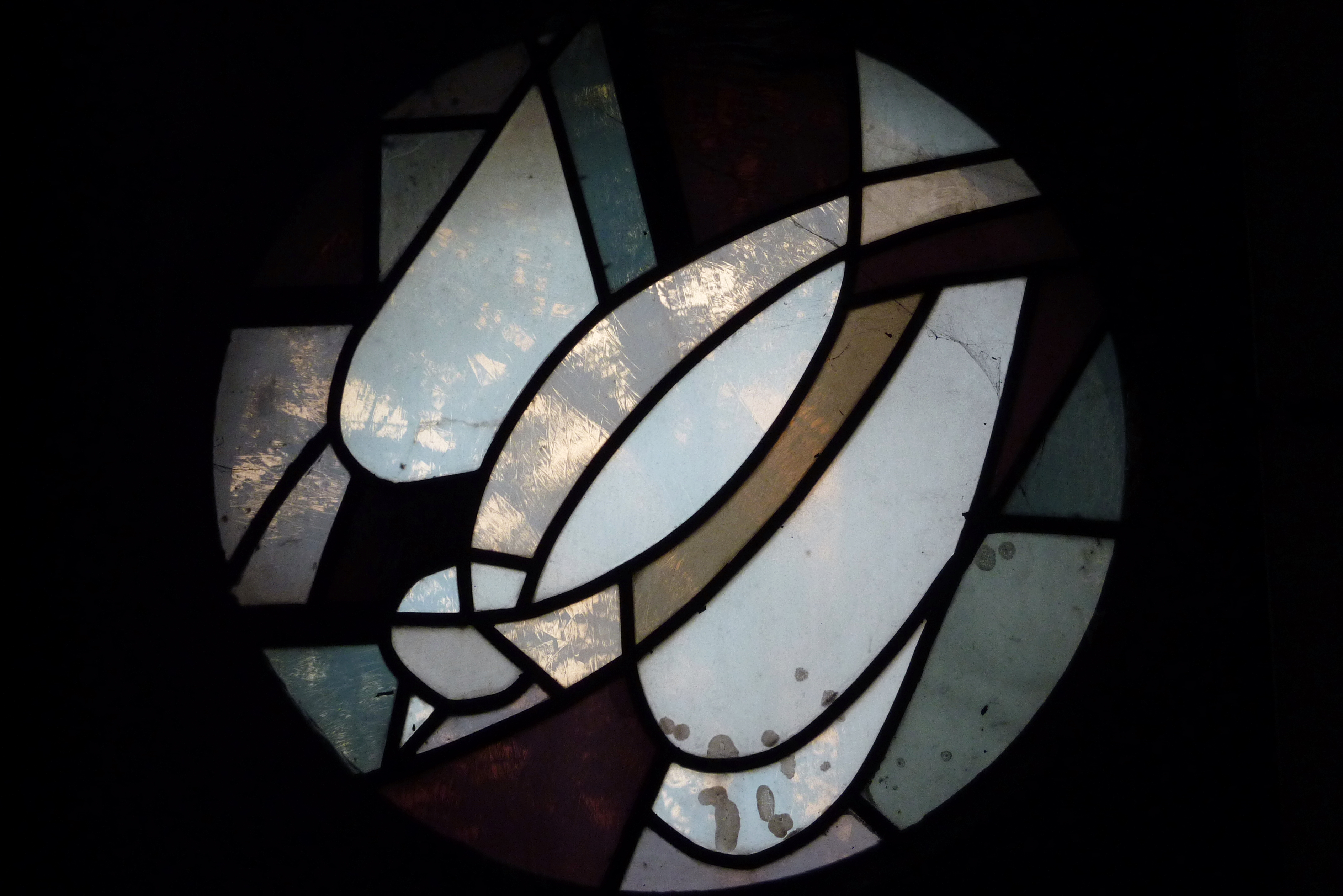 Betonglasfenster in der katholischen Pfarrkirche Heilige Familie in Block, Darstellung: Taube